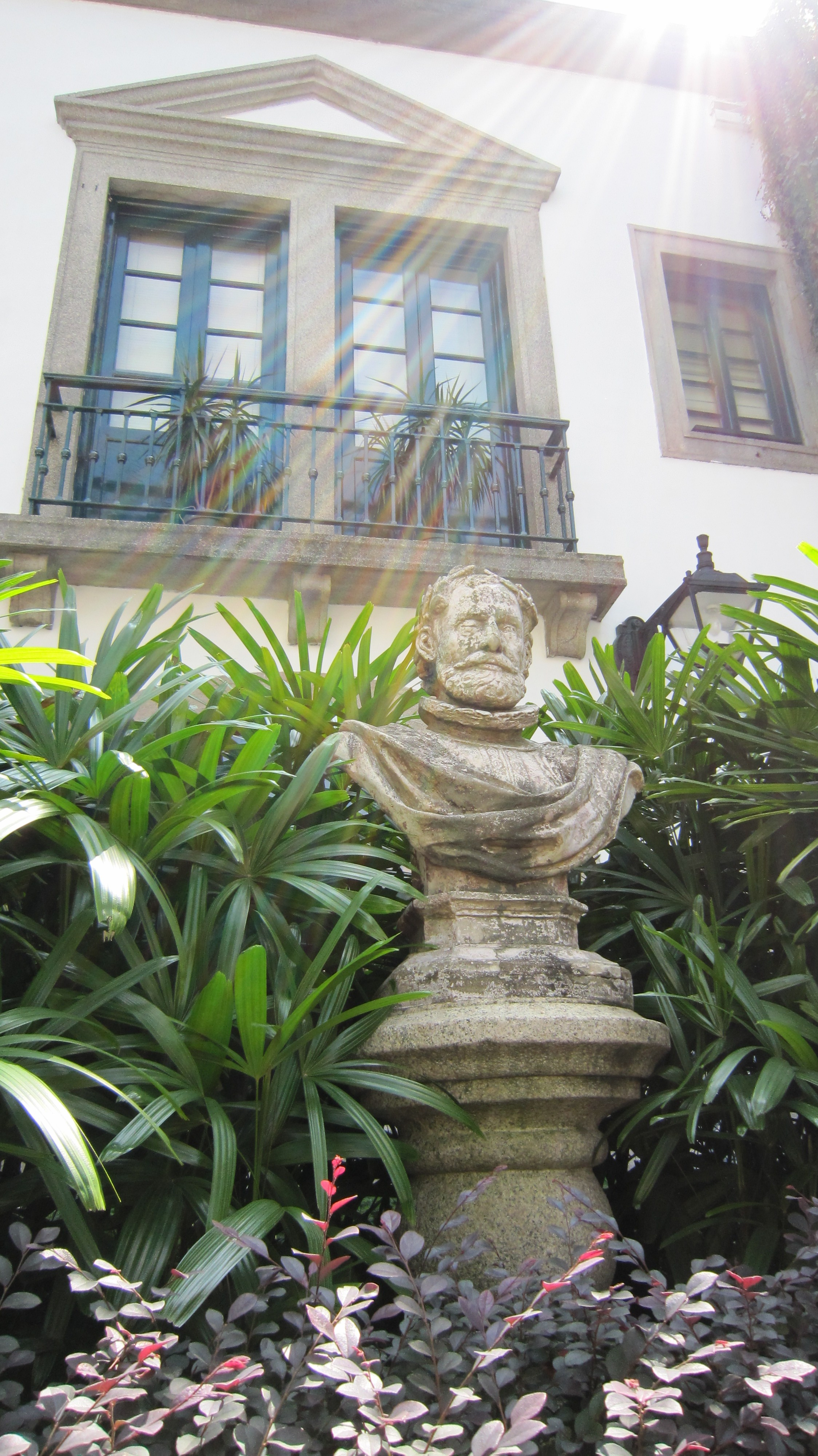 Luís Camões no Edifício Leal Senado